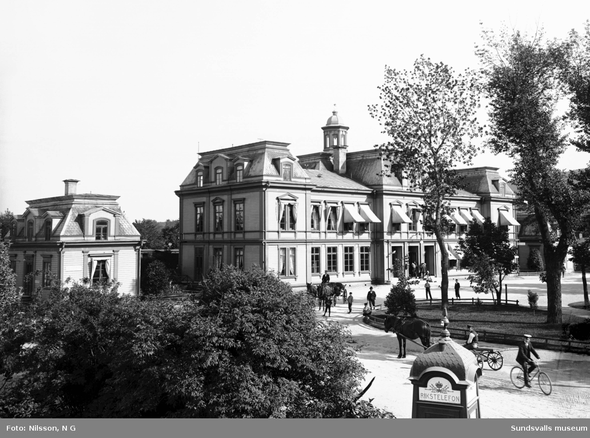 Gamla järnvägsstationen, Sundsvall, från 1874.